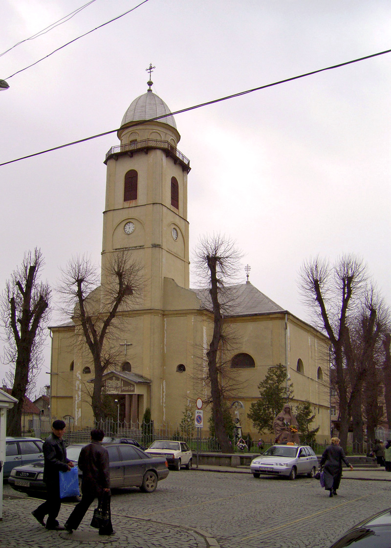 Греко-католицький Успенський Собор, Мукачеве, вул.Федорова,2 корп.1